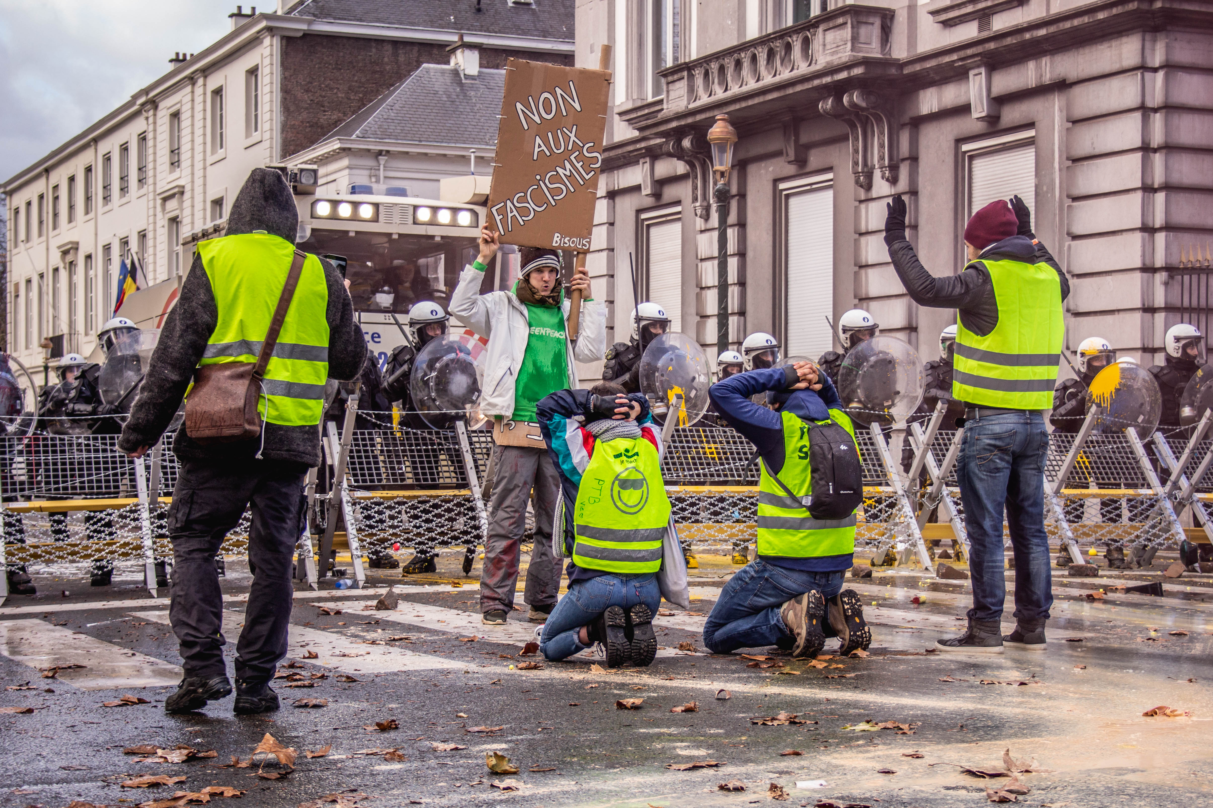 2018-12-08 Gele hesjes Brussel NON AUX FASCISMES